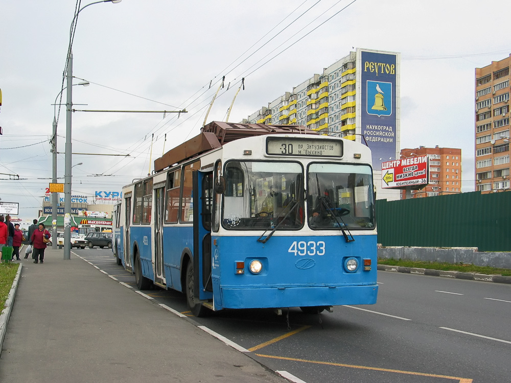 Перегонка троллейбуса БТЗ-5276.01 № 4933 в Новокосинский парк. Городецкая улица, 25.09.2009.